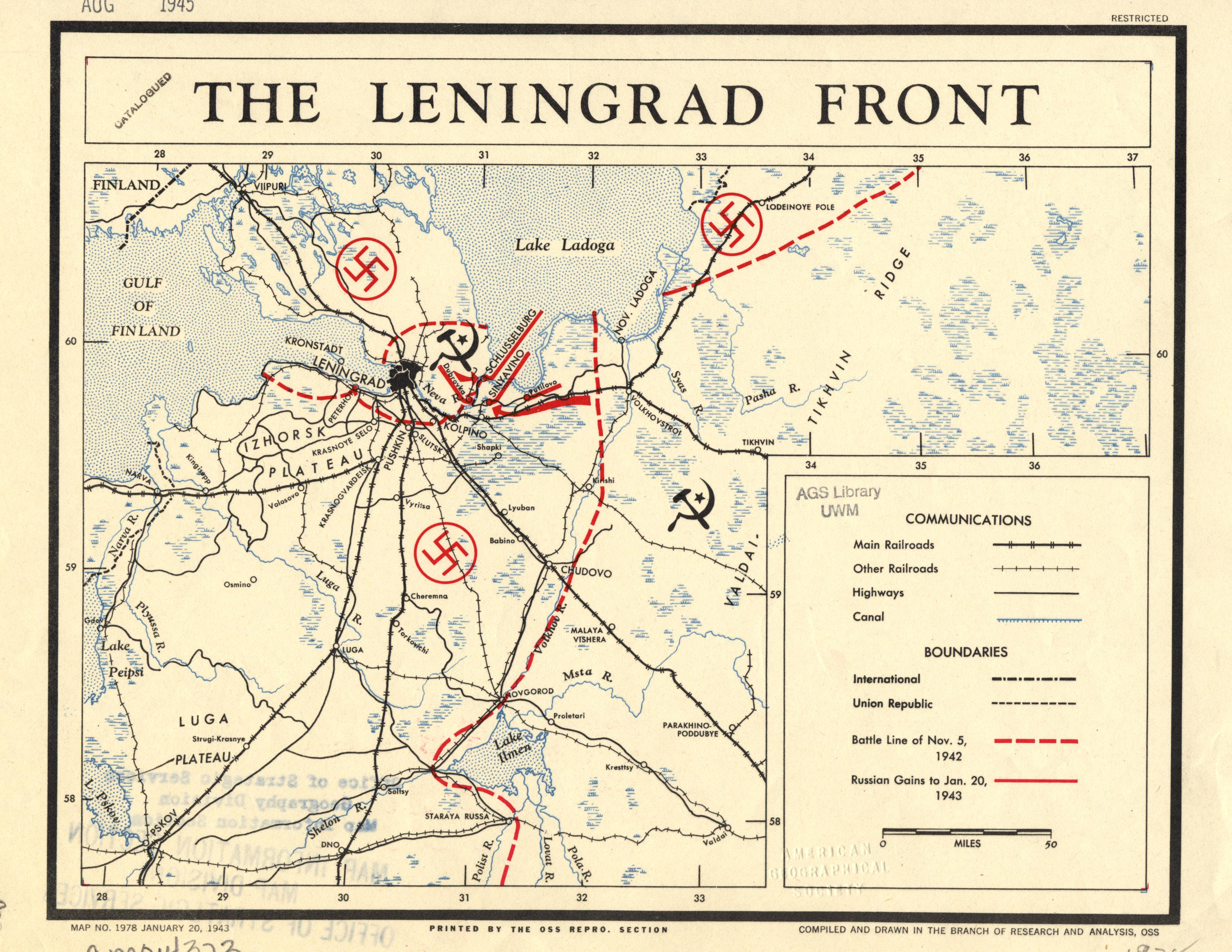 1943 Leningrad Front